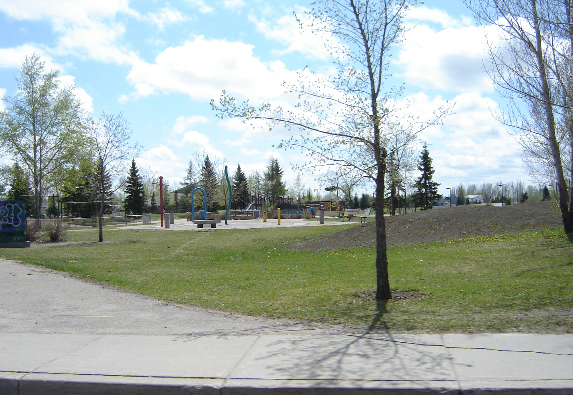 Les Kerr Park Forest Grove, Saskatoon